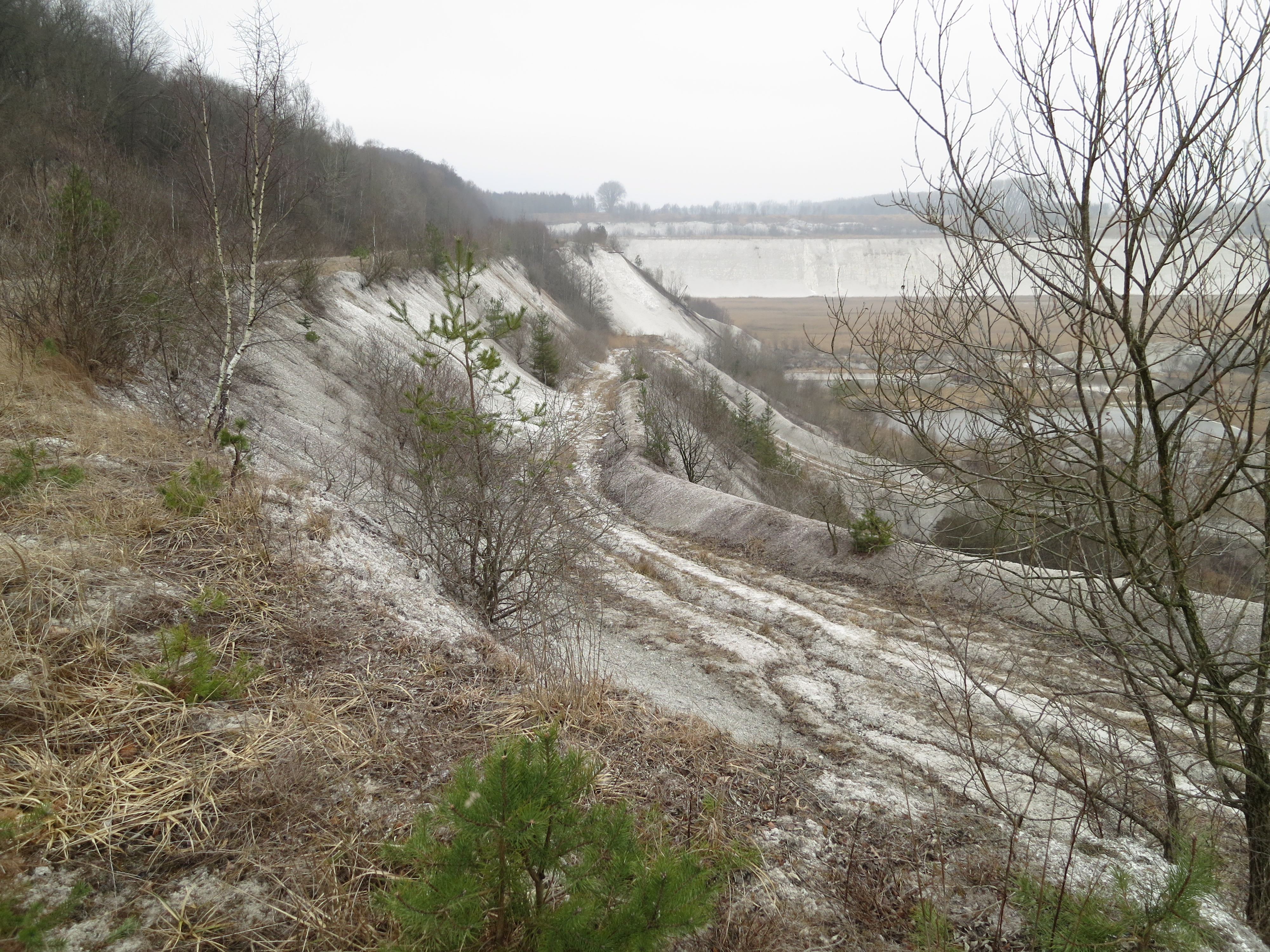 Kreidegrube Saturn; Blick entlang des Westrandes der Kanzel Richtung Nordnordwesten